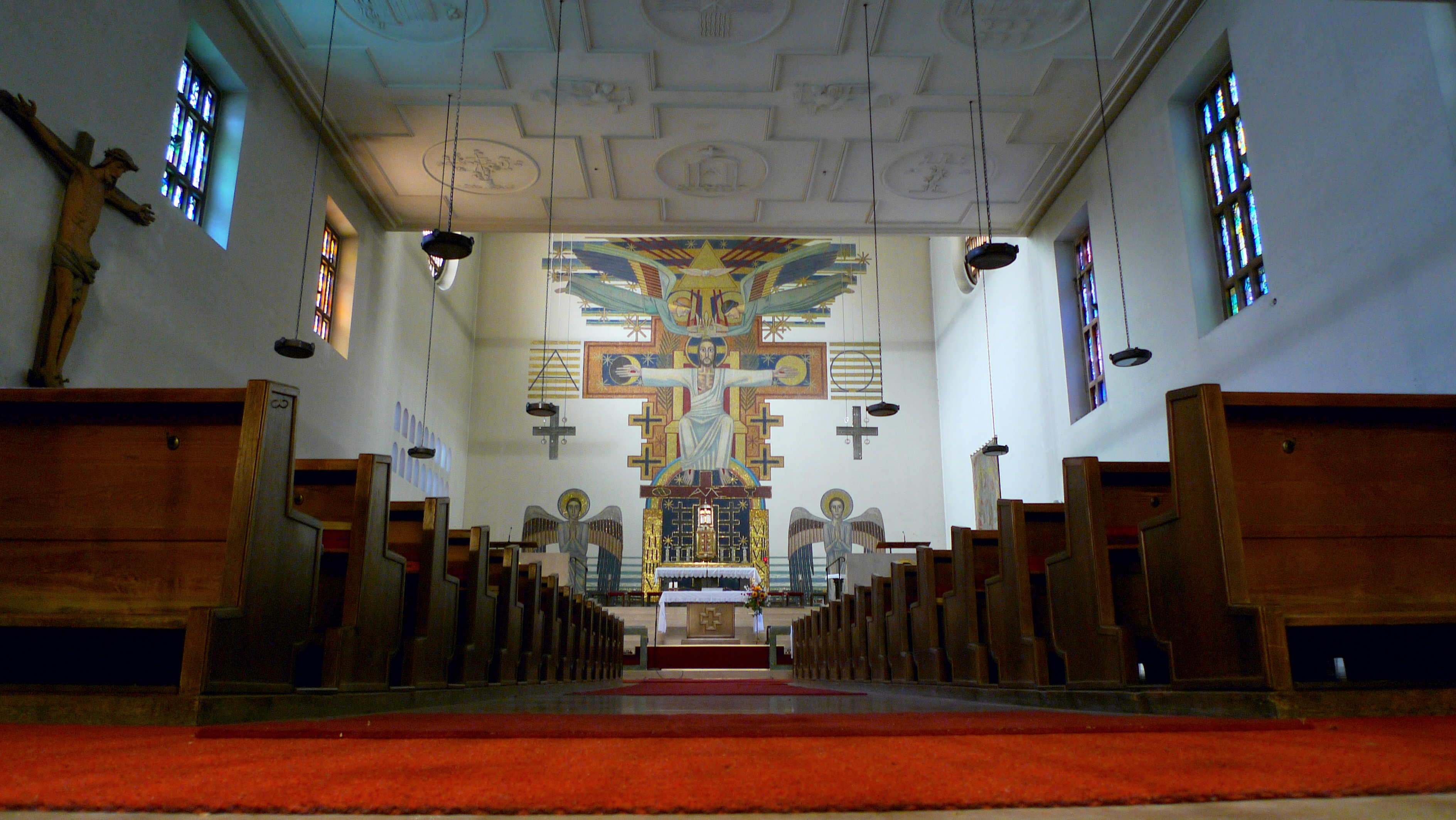 Kath. Pfarrkirche, Christ-Königkirche